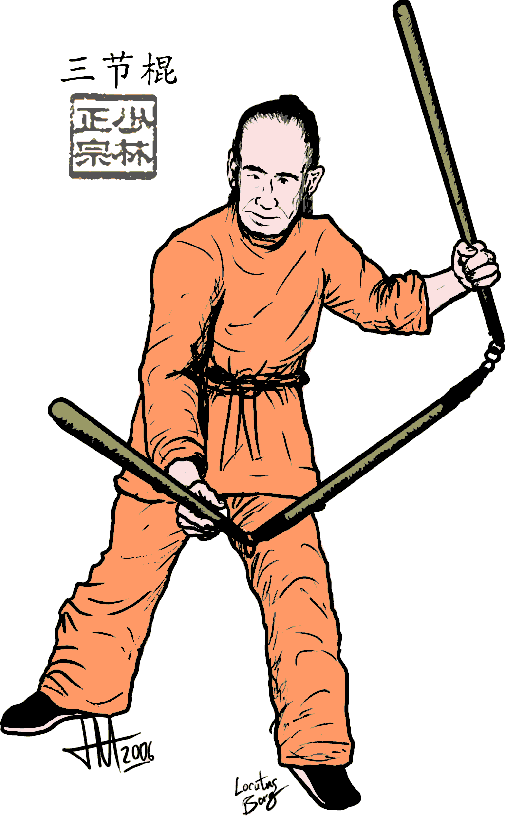 San jie gun Kung-fu weapon